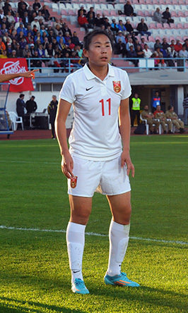 a_46_6723